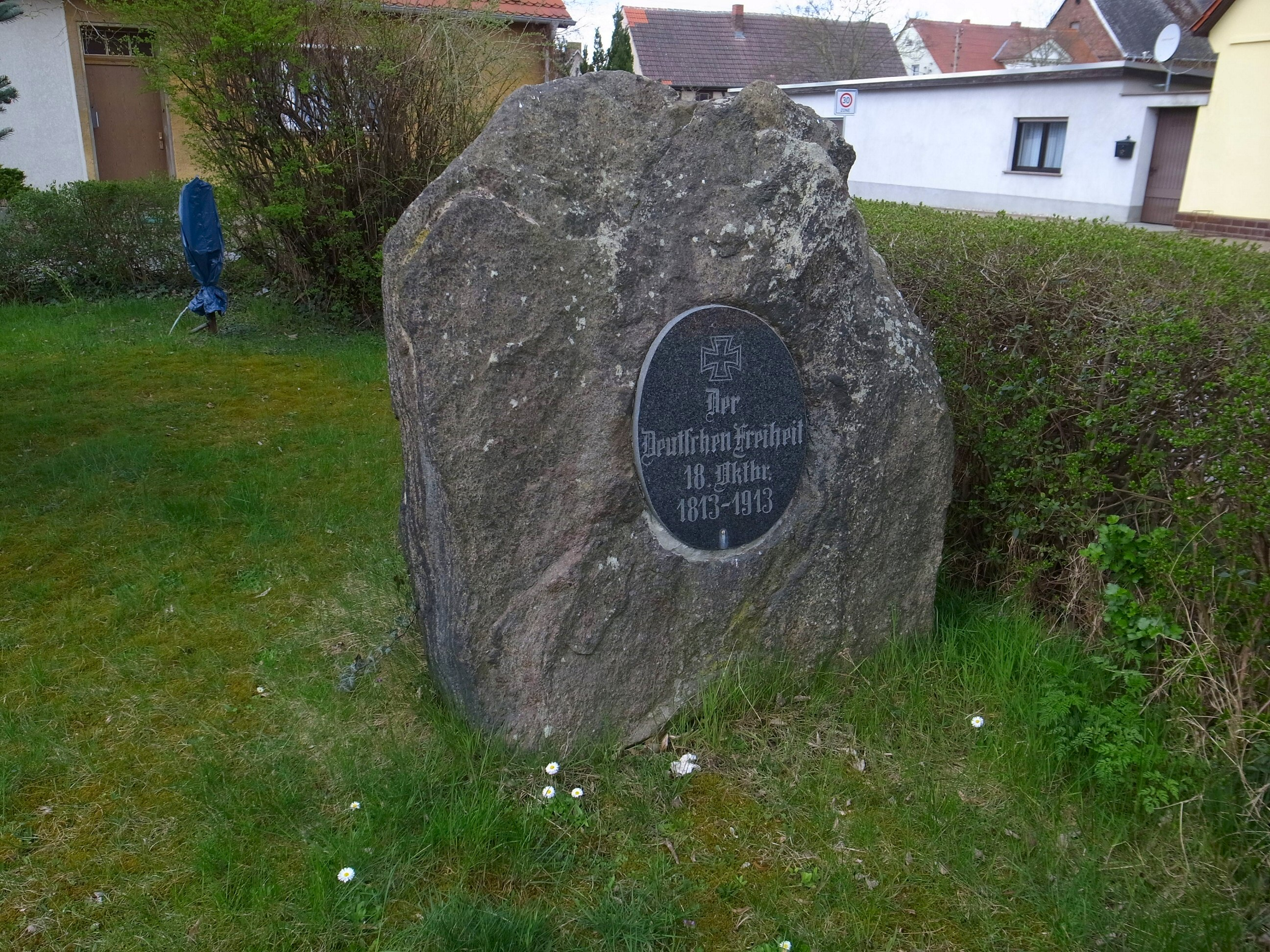 Südliches Anhalt, Ortsteil Quellendorf, Gedenkstein 18. Oktober 1813-1913 (Baudenkmal im Denkmalverzeichniss Sachsen-Anhalt, Erfassungsnummer: 094 70899 000 000 000 000 [1])